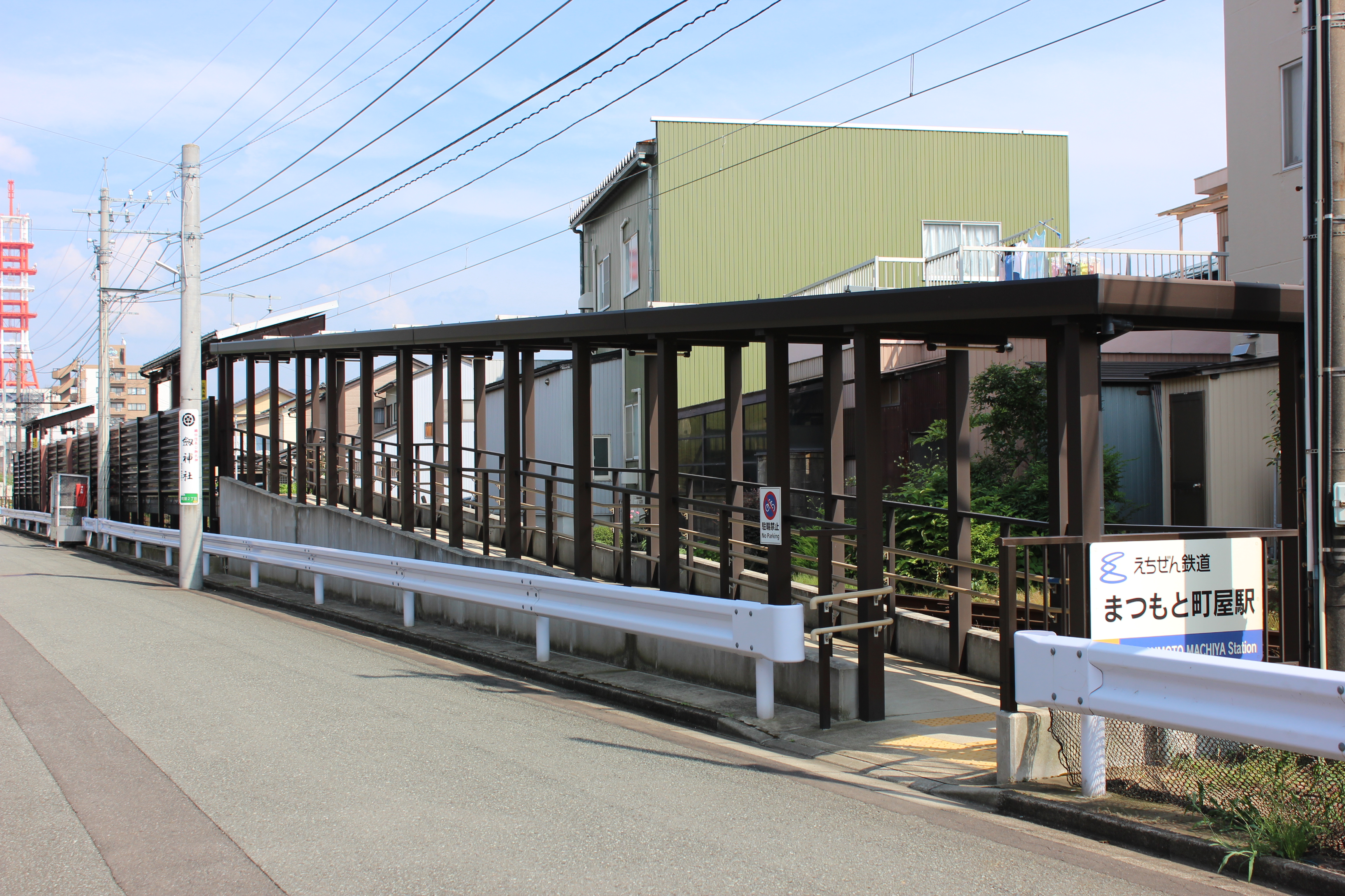 えちぜん鉄道三国芦原線まつもと町屋駅